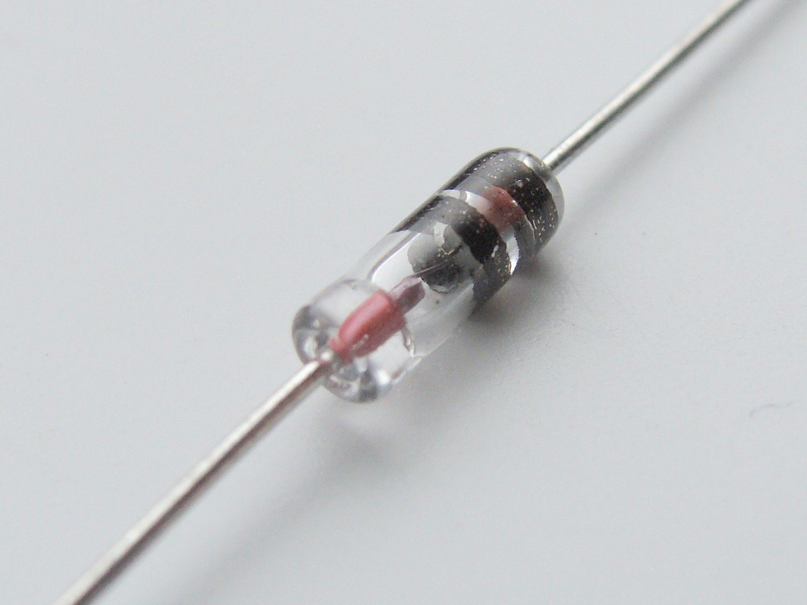 Germanium Diode 1N60P